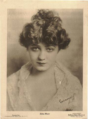 Edna Mayo